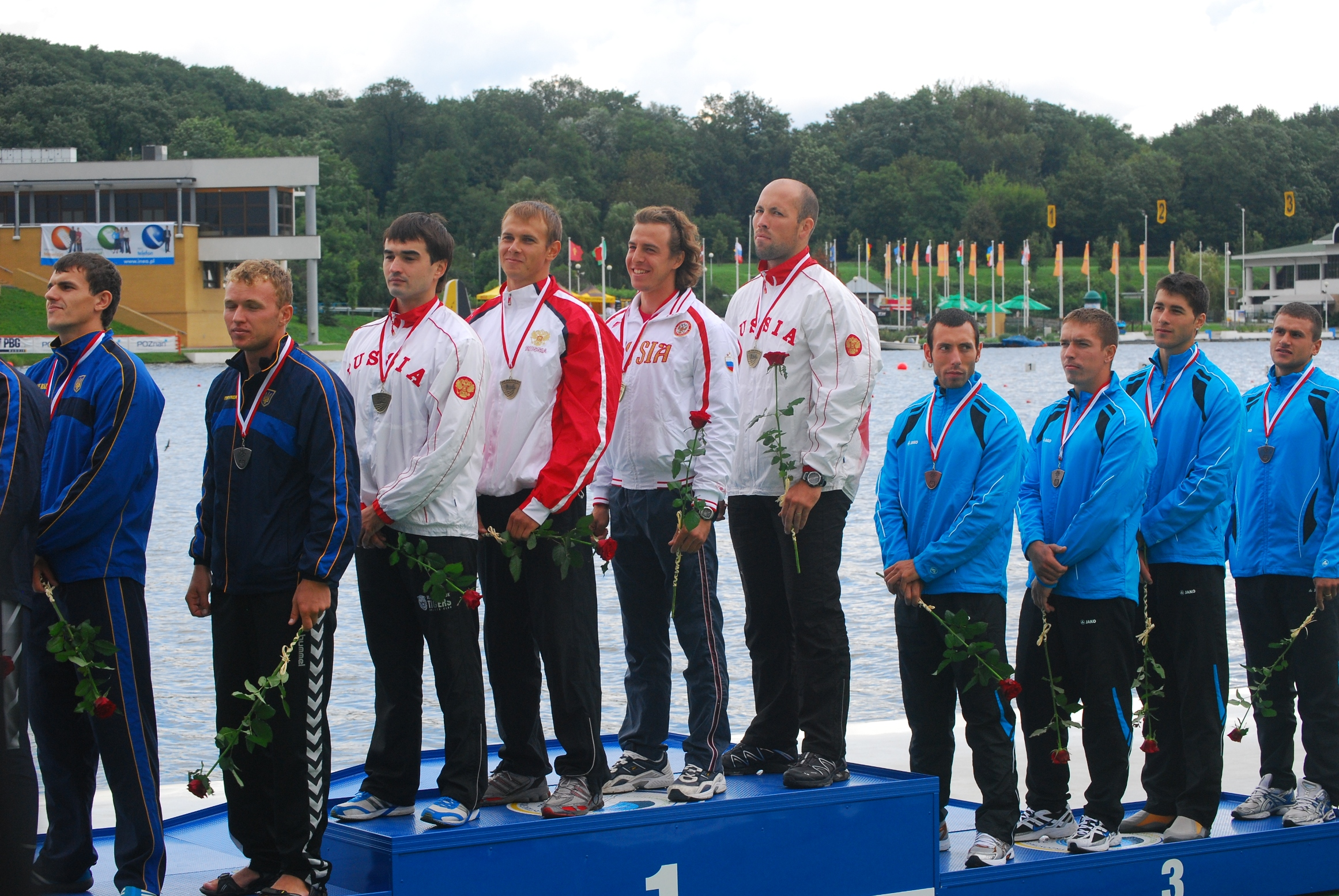 Dekoracja zwycięskich ekip w wyścigu C4 na 200m podczas IV Akademickich MIstrzostw Świata w Kajakarstwie 2010